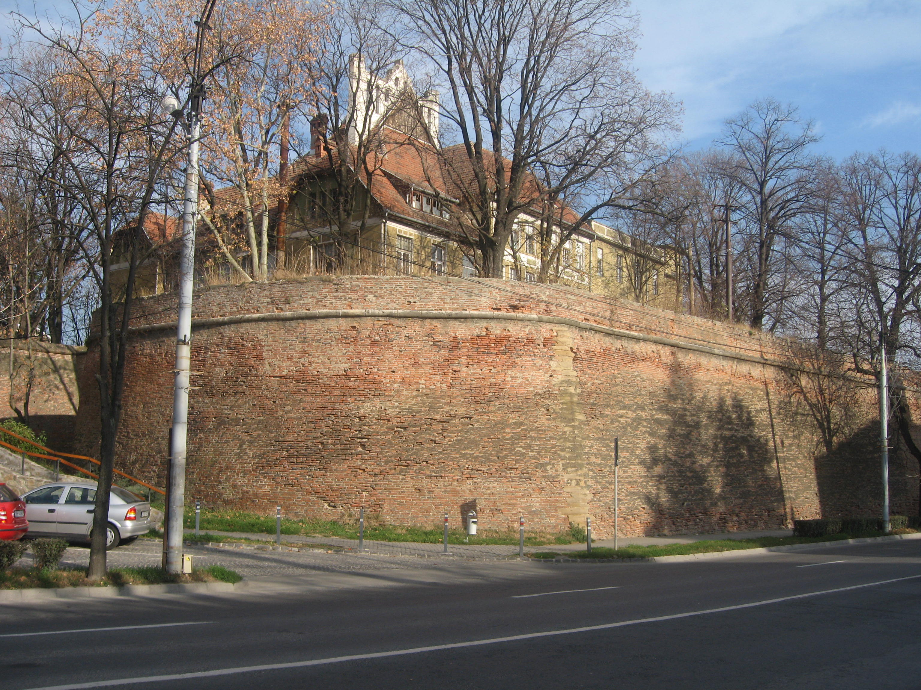 Bastionul Haller din Sibiu 05